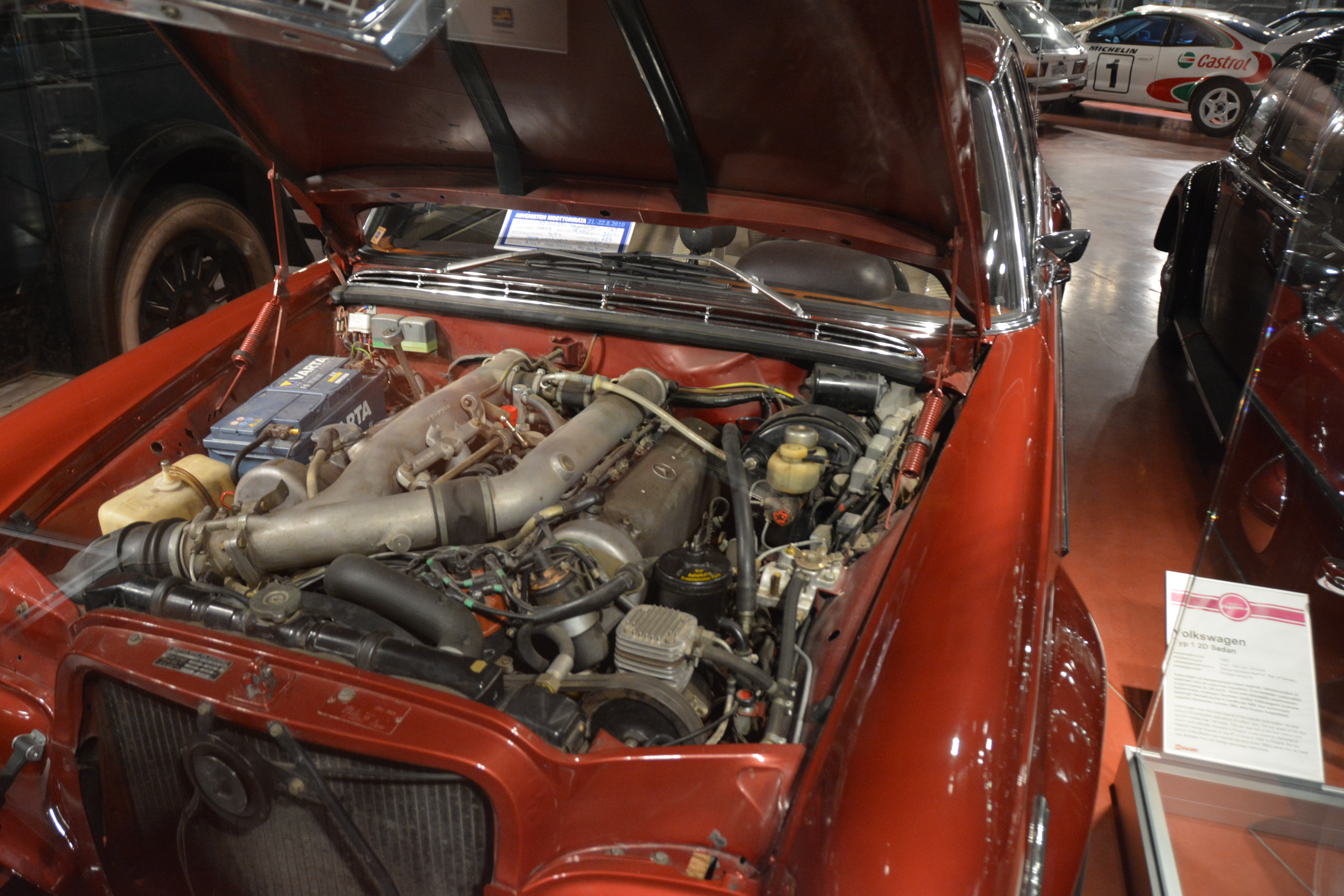 Mercedes-Benz Waxenberger konehuone